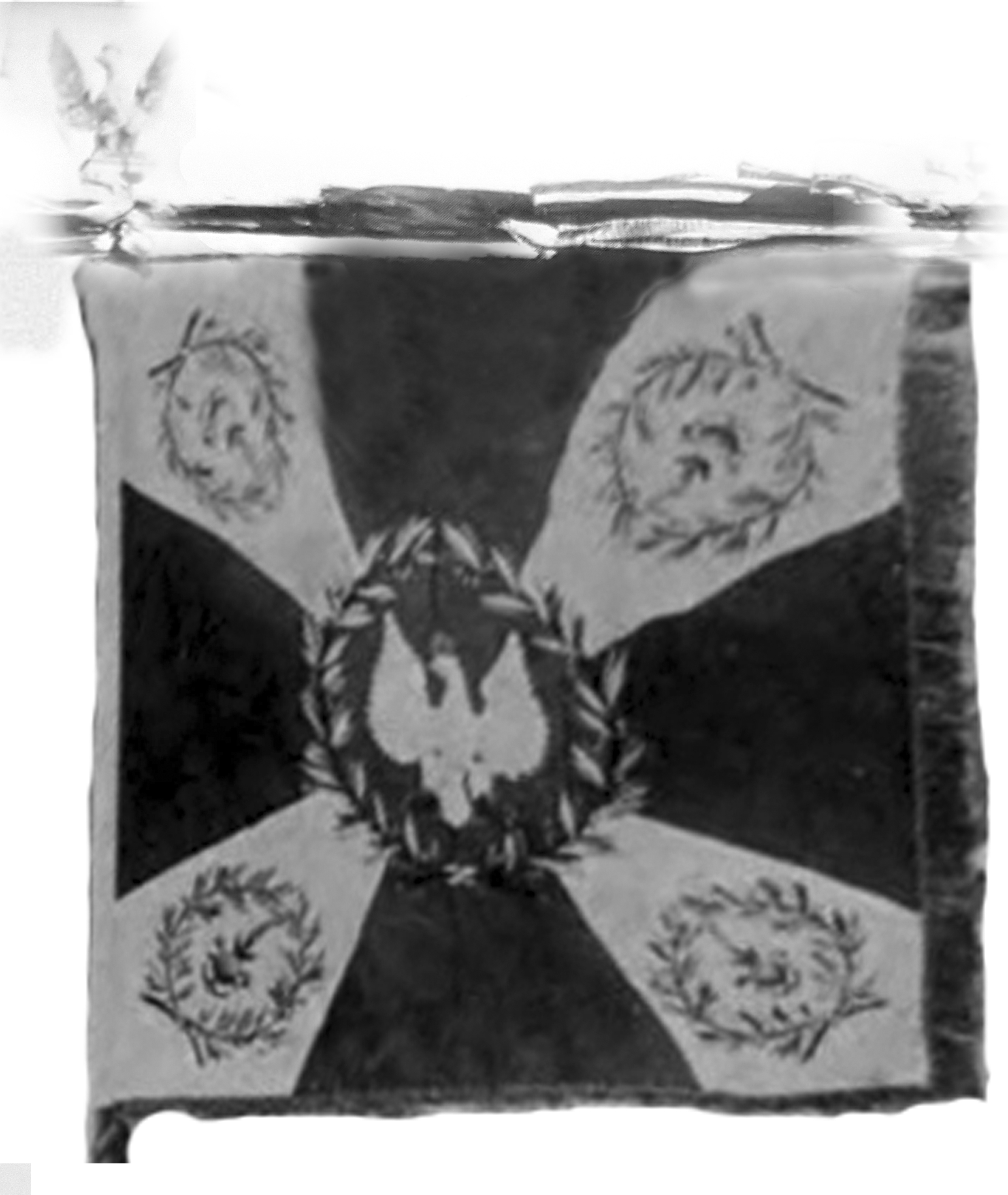 prawa strona sztandaru 7 pułku saperów